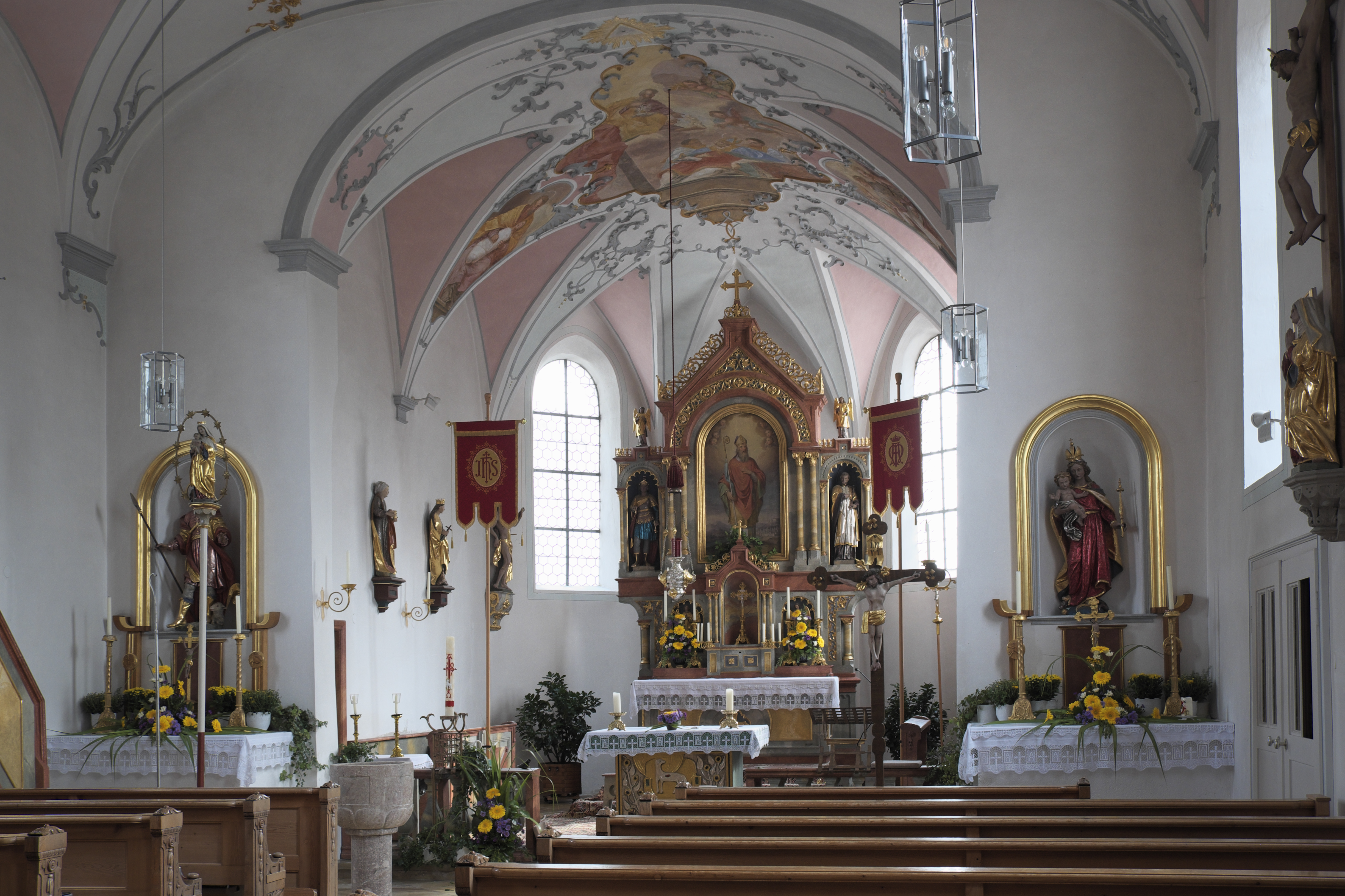 Katholische Pfarrkirche St. Rupert in Oberdießen (Unterdießen) im Landkreis Landsberg am Lech (Bayern/Deutschland), Innenraum